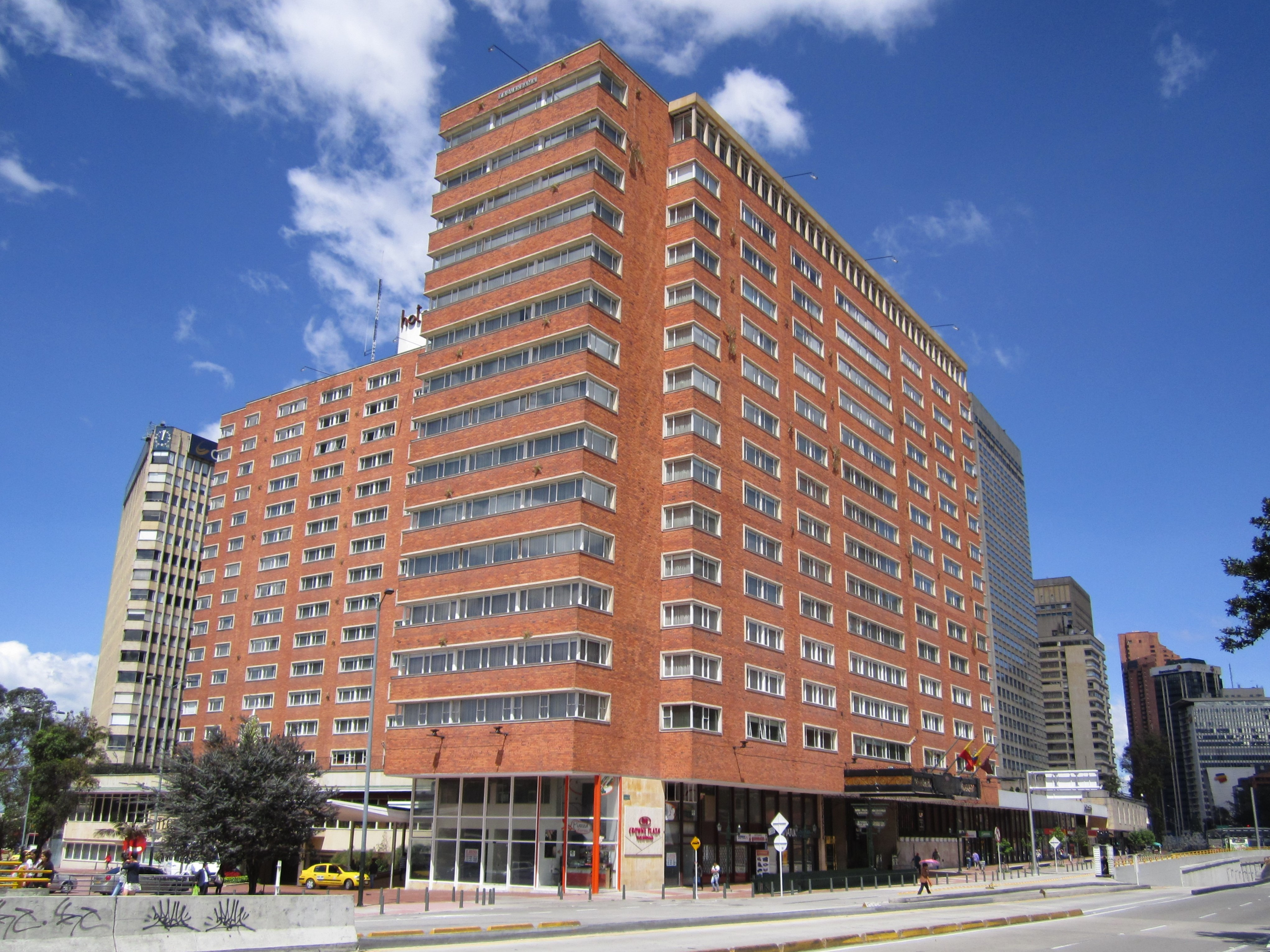 Bogotá carrera 10 con calle 26. Hotel Tequendama.